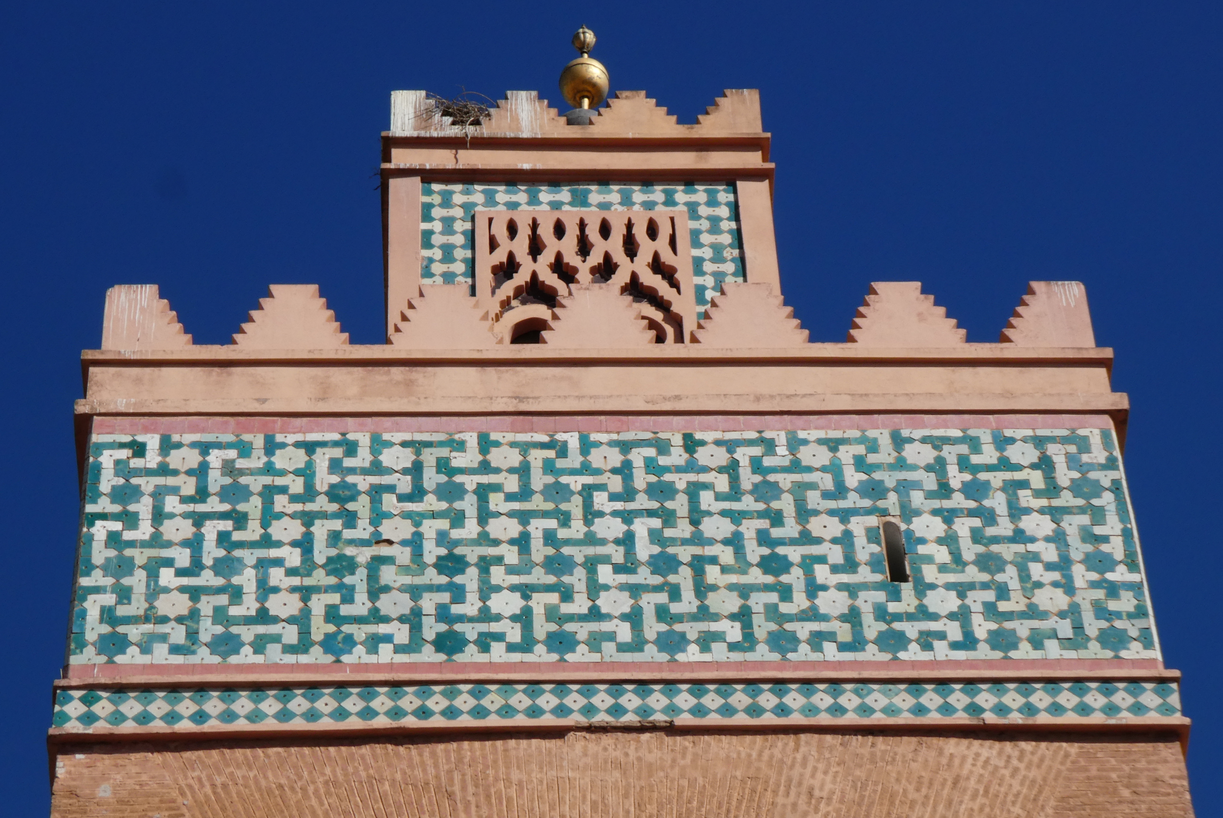 Morocco - Marrakech - mosque tiles